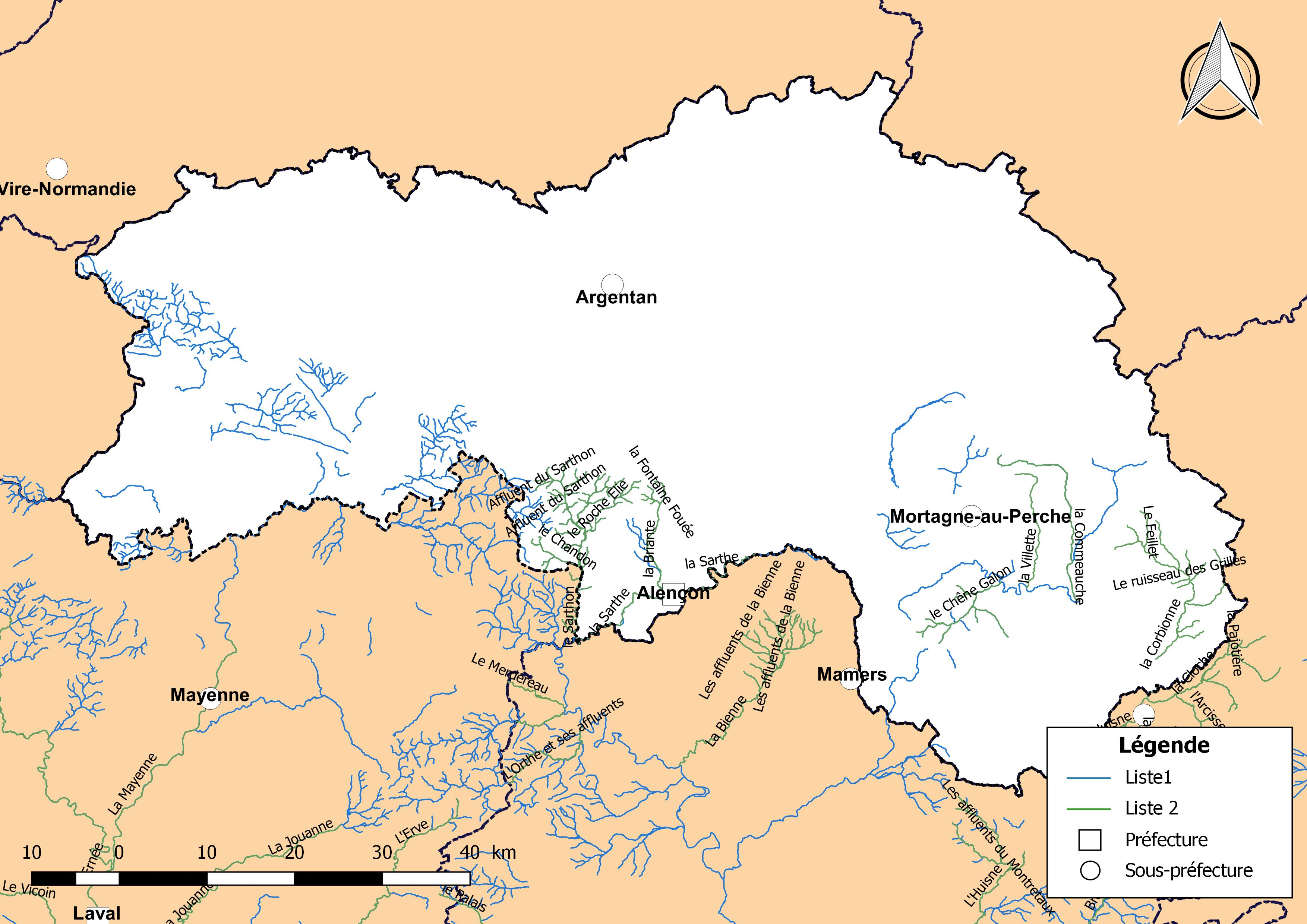 Classement des cours d'eau du département de l'Orne (France) au titre de la continuité écologique (article L214.17 I du Code de l'environnement).